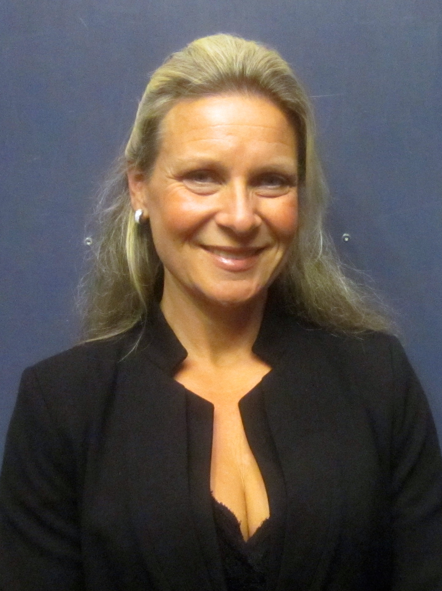 Operasångare Annalena Persson